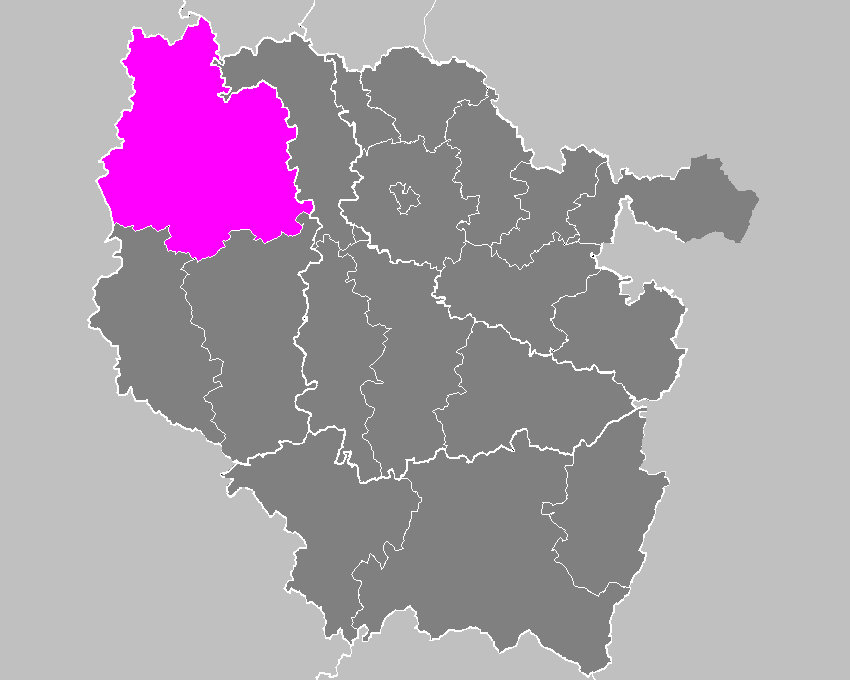 Maps of arrondissements and cantons of France: Arrondissement de Verdun.PNG